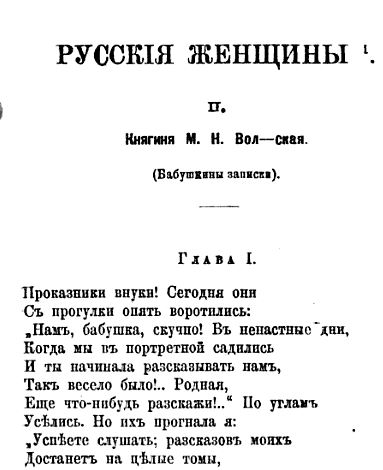 Отечественные записки, 1873, том 206. Поэма "Русские женщины" , Н. А. Некрасов.